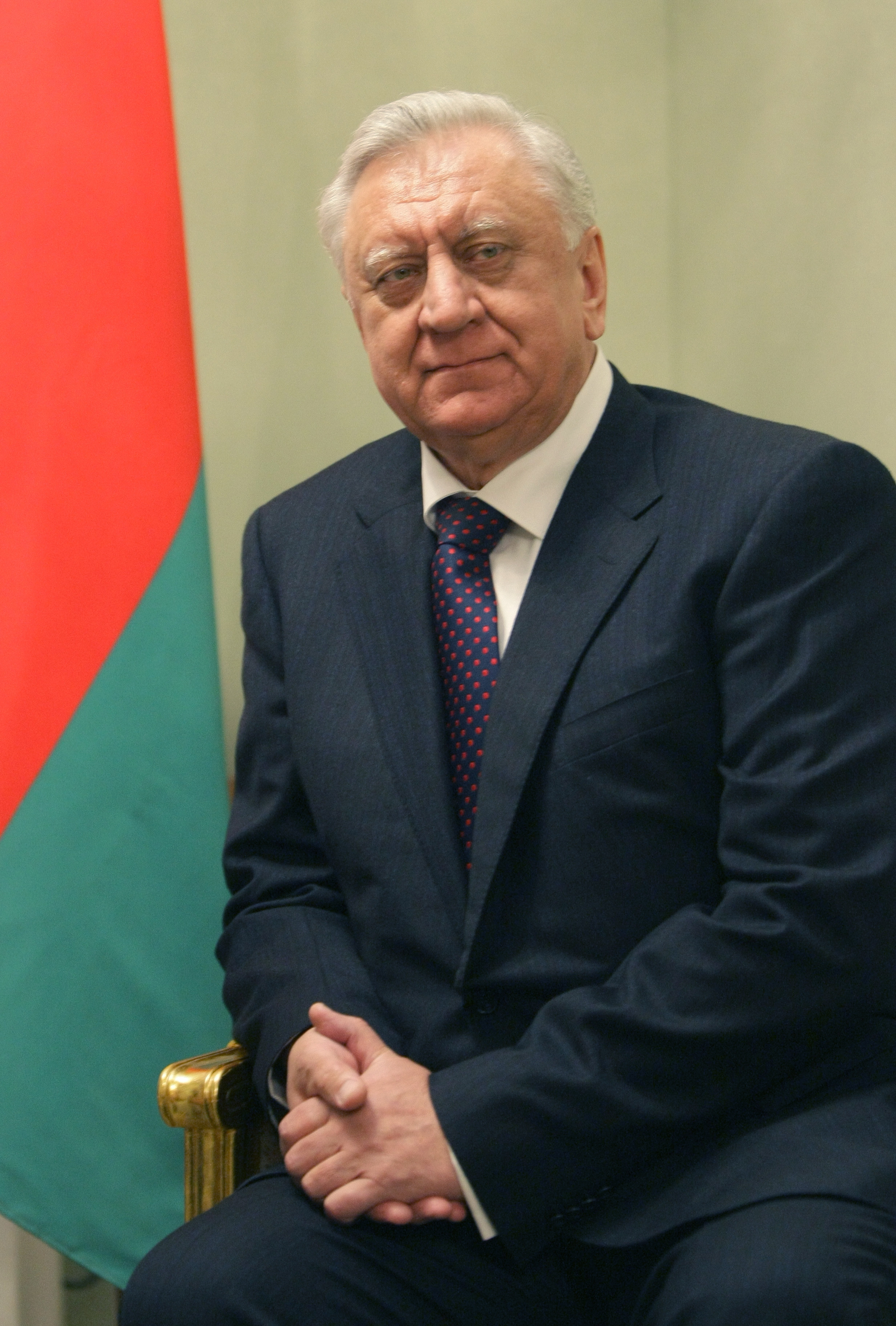 Премьер-министр Республики Беларусь М.В.Мясникович на встрече с Председателем Правительства Российской Федерации В.В.Путиным